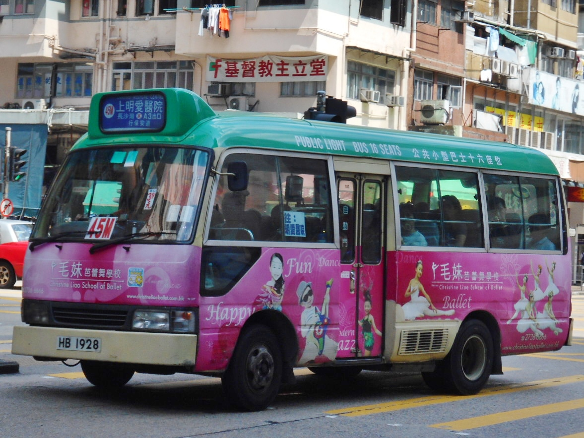 九龍專線小巴45M線，駛經長沙灣政府合署前往明愛醫院